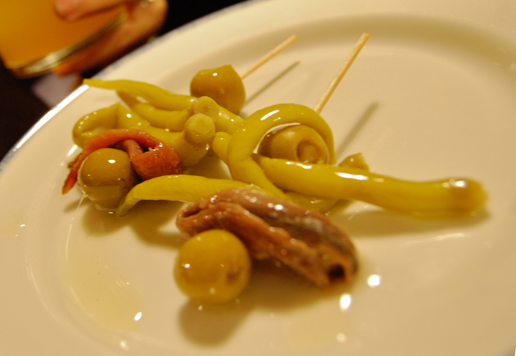 Plato de gildas, servido en La Cepa, San Sebastián.